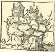 Illustration zur Burg Rötteln in der Cosmographia Universalis von Sebastian Münster aus dem Jahre 1545